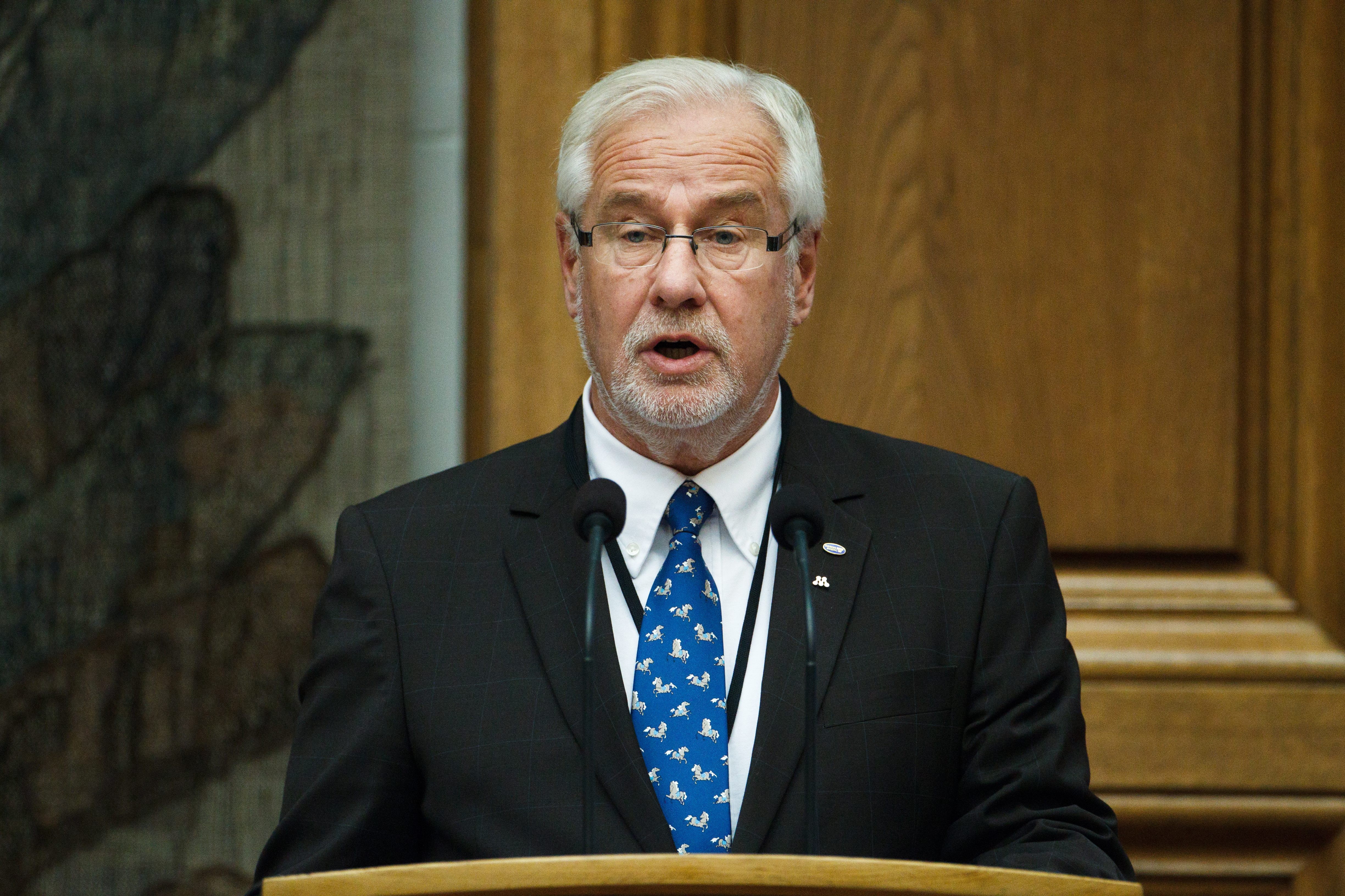 Göran Montan vid Nordiska Rådets session 2011 i Köpenhamn.